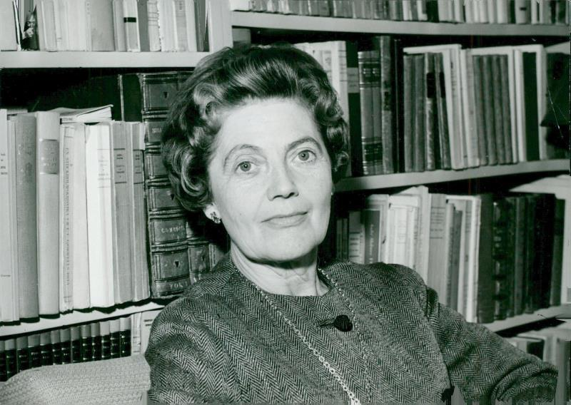 Pressfoto på Dagmar Edqvist infört i Svenska Dagbladet 1967-02-14 sid 25. Baksidesdaterat 1965.